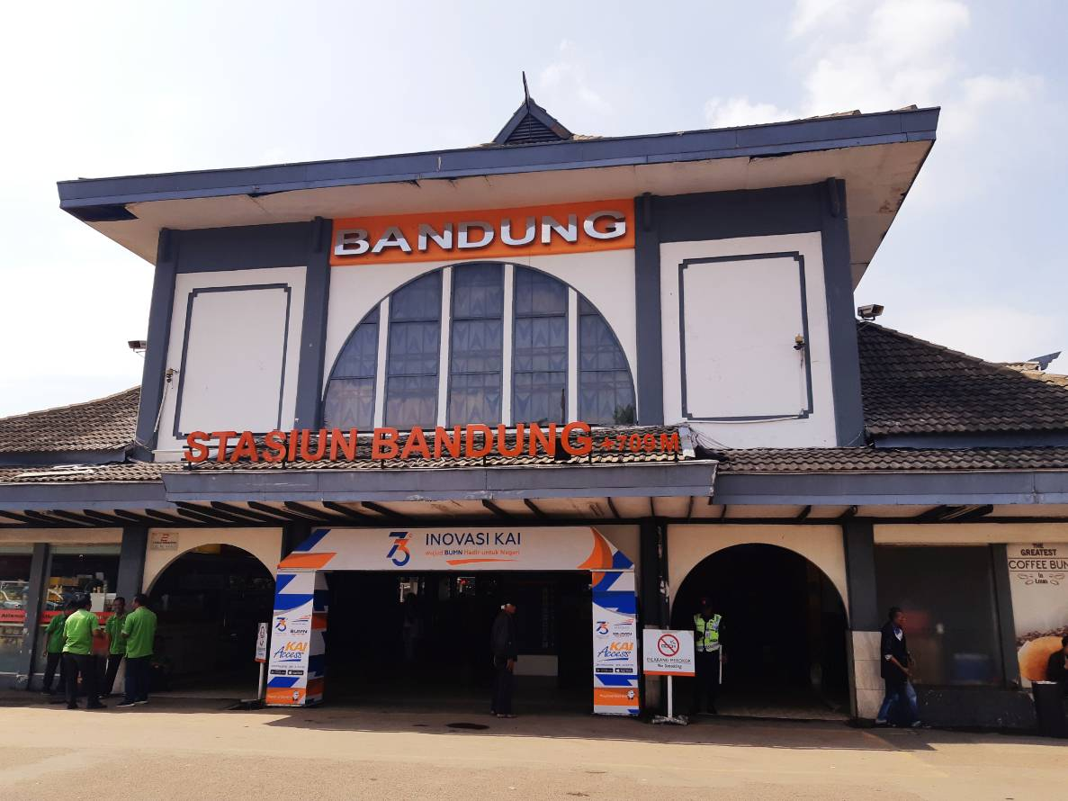 Stasiun Bandung